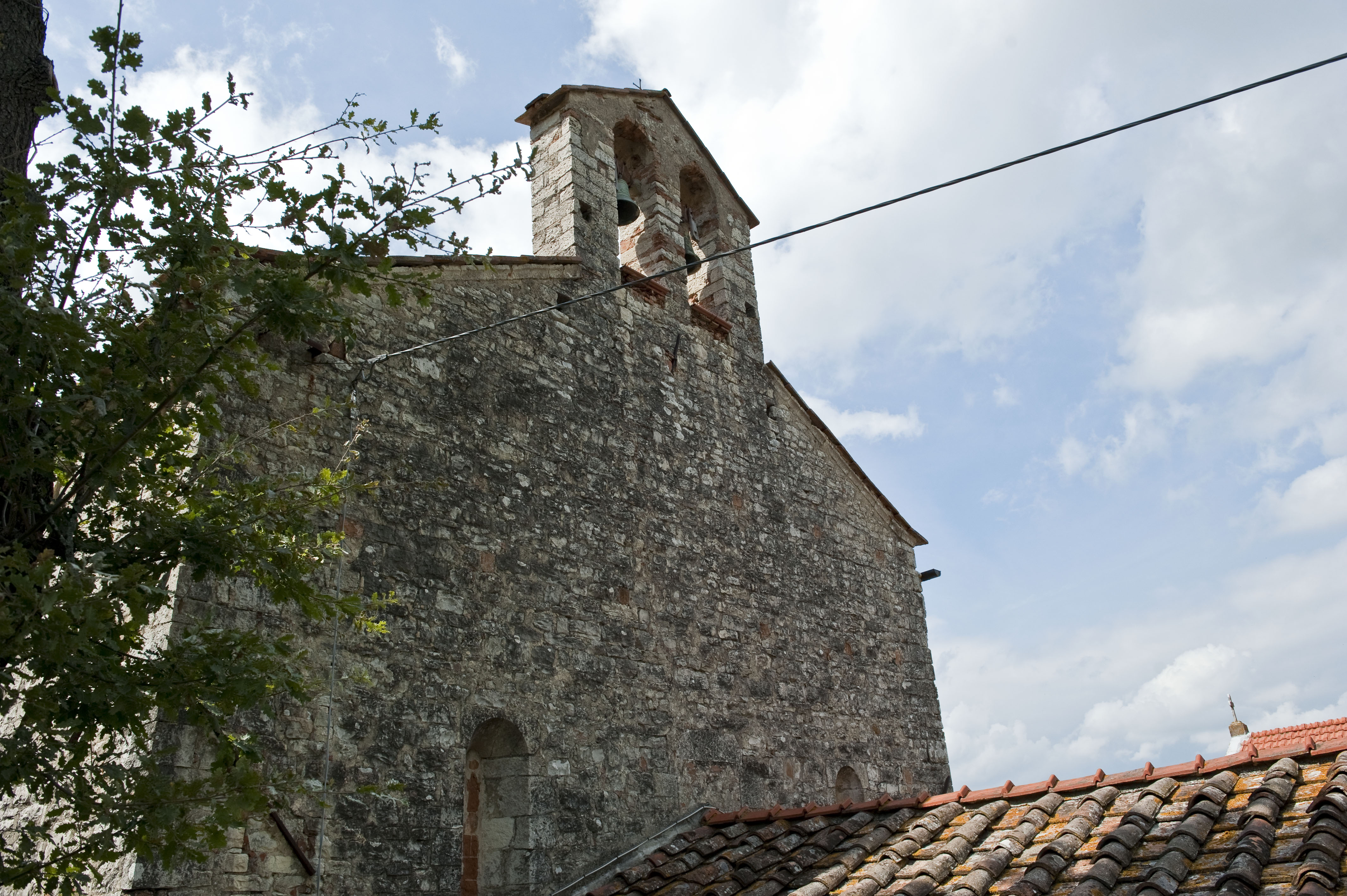 Fronte posteriore dell'oratorio del beato Gherardo (Bagno a Ripoli)